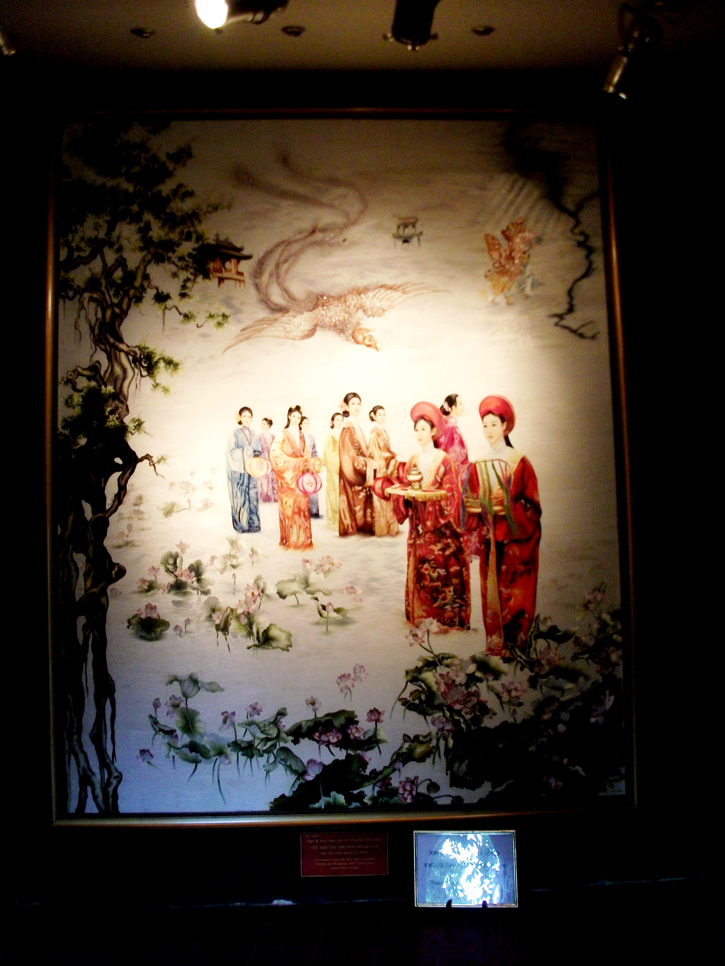 Một tác phẩm thêu tay được trưng bày trong X-Q sử quán ở thành phố Đà Lạt, Việt Nam.